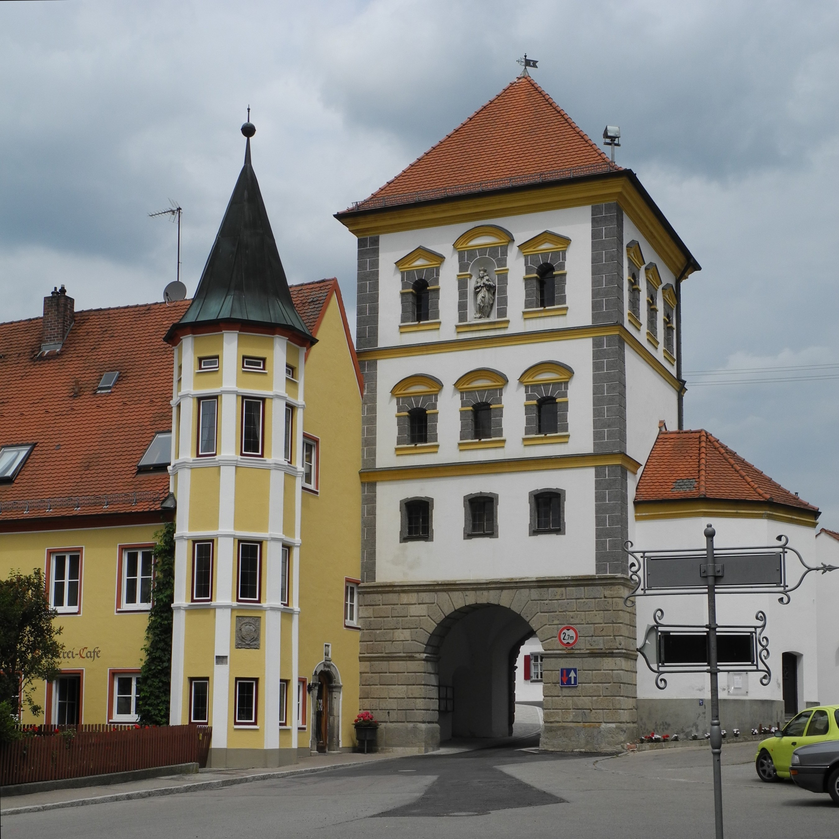 Kaisheim - Stadttor